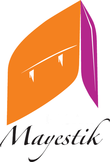 Logo Mayestik